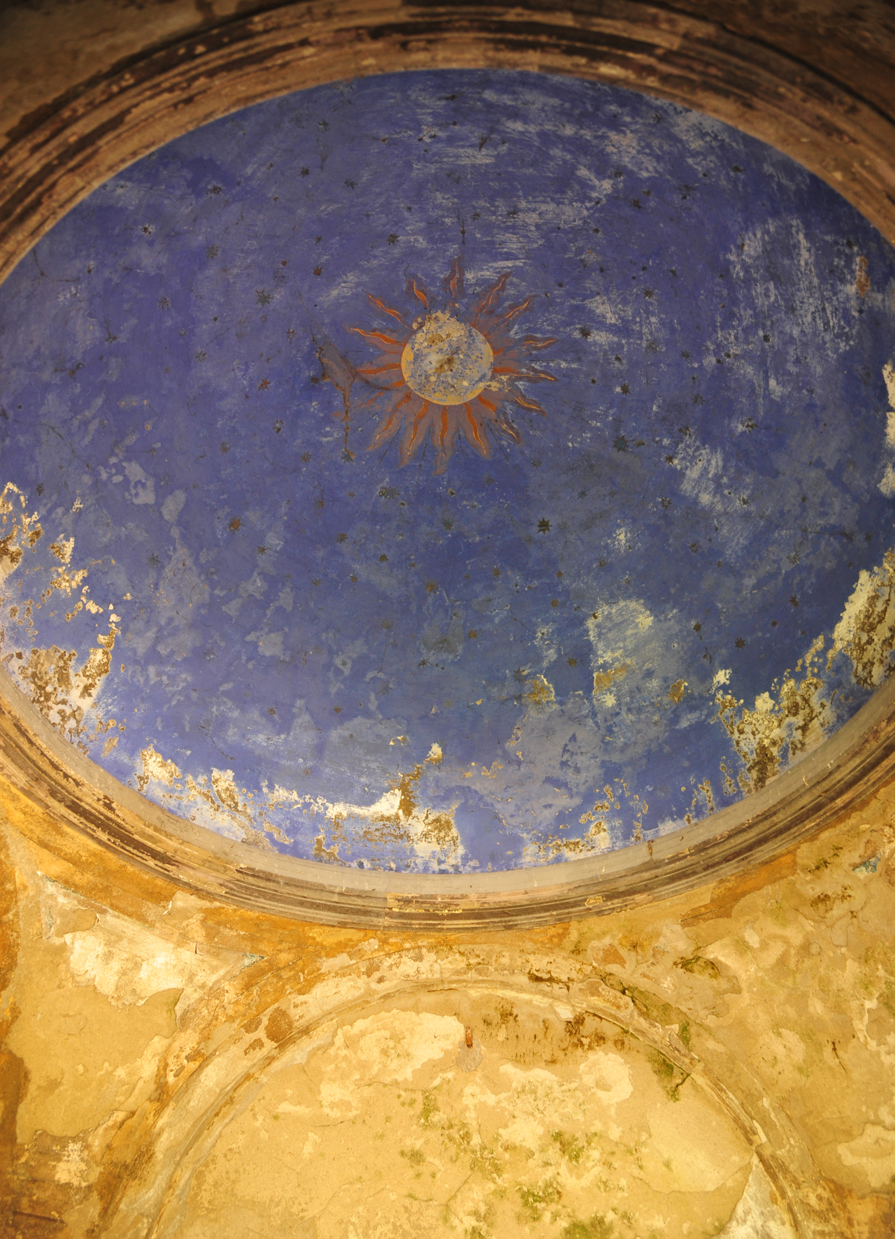 Rio Mezzano Paullo4